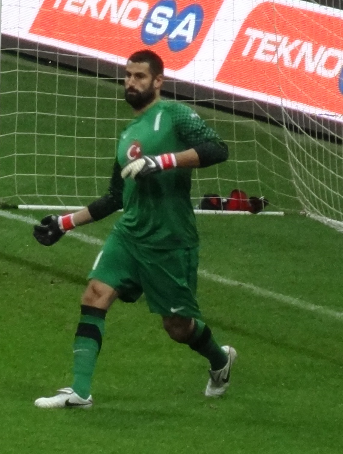 Volkan milli takım formasıyla